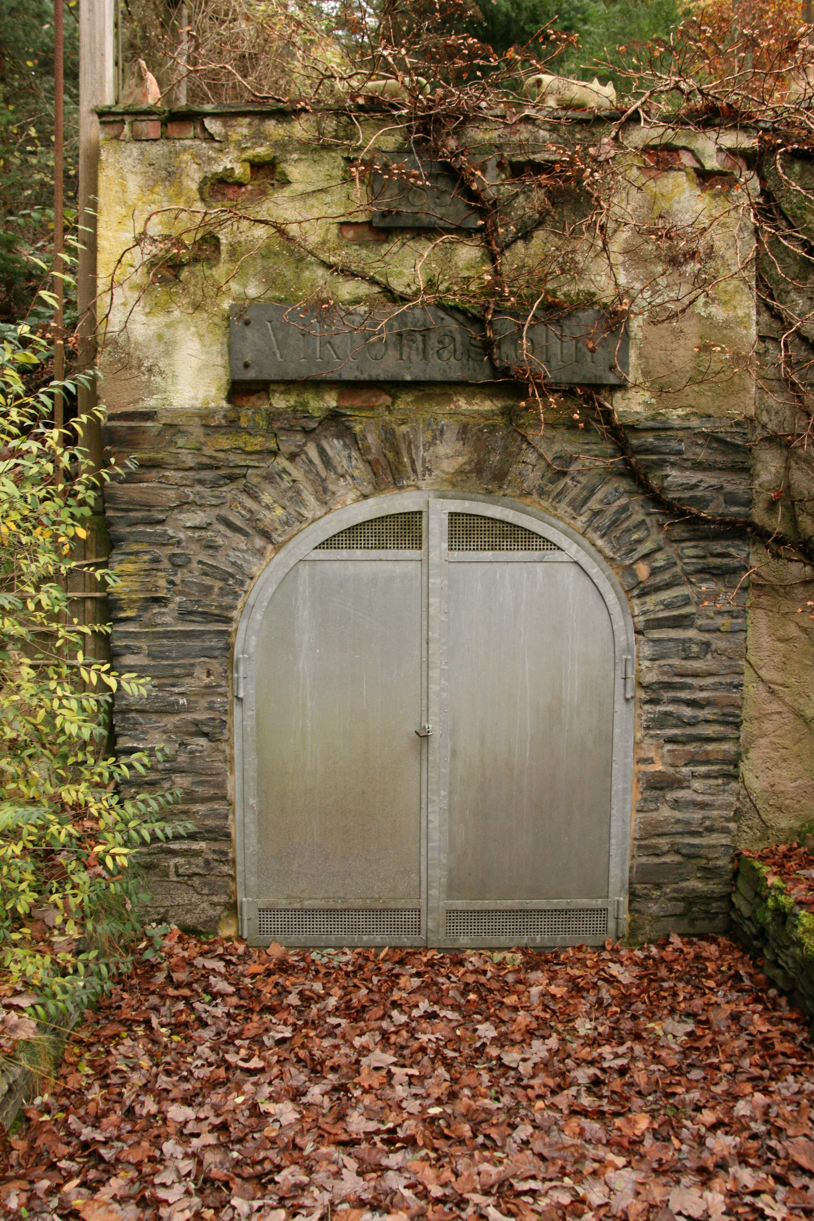 Ehemaliges Schieferbergwerk Grube Viktoria: Mundloch des Viktoriastollens, Kaub, Rheinland-Pfalz. Aufschrift: 1897, Viktoriastolln. Ansatzhöhe: 289,0 müNN